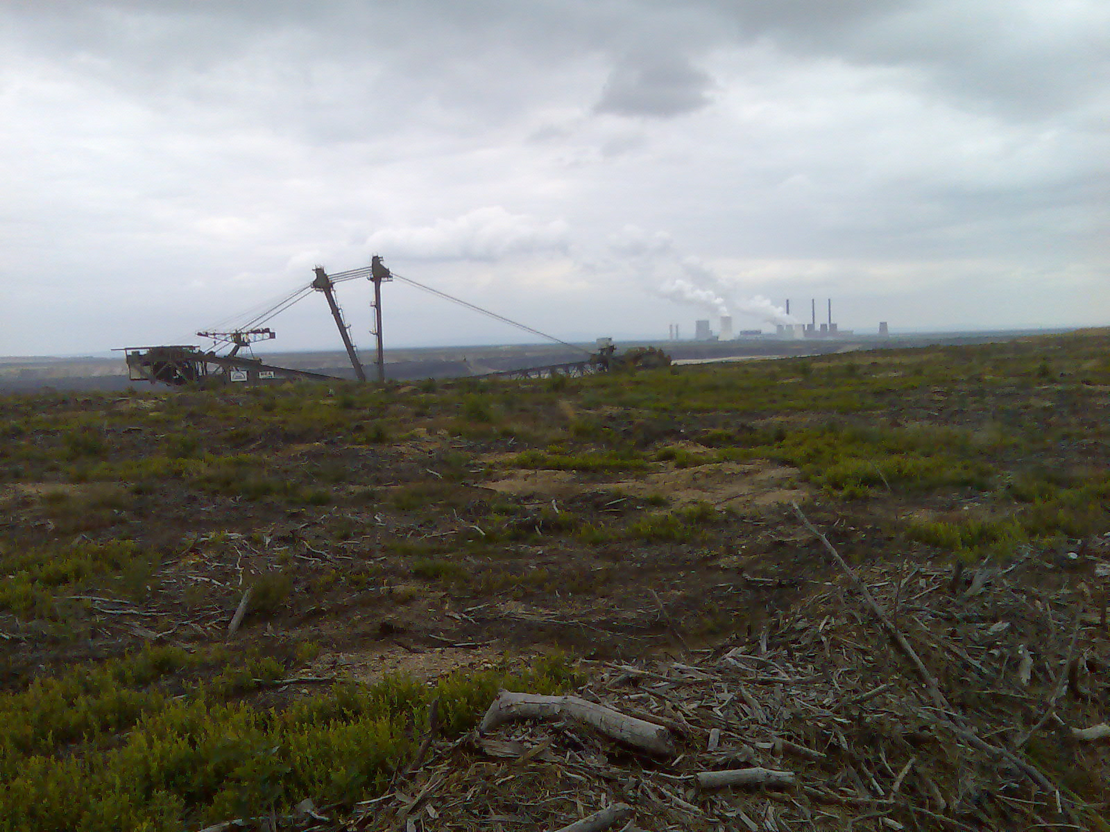 Kraftwerk Boxberg von der Tagebaukante, im Vordergrund ein Schaufelradbagger des Tagebaus Nochten